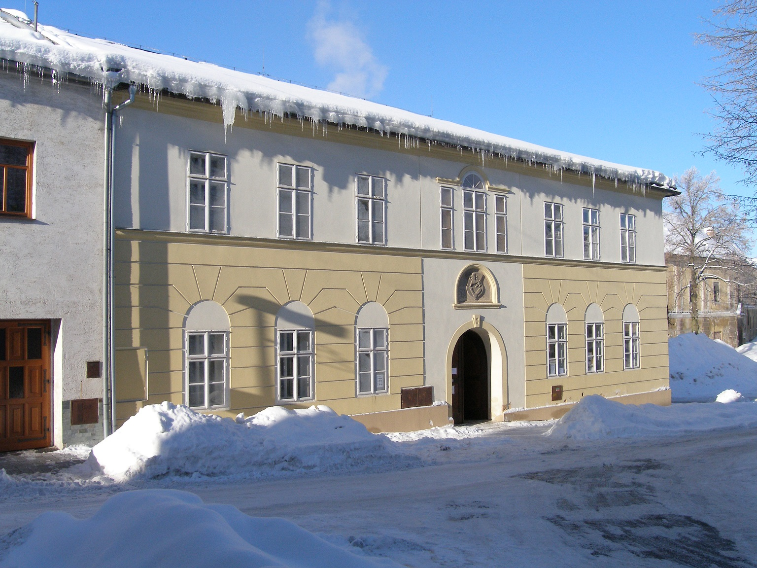 Toužim, bývalá radnice čp. 35 na náměstí Jiřího z Poděbrad (stav po rekonstrukci fasády).